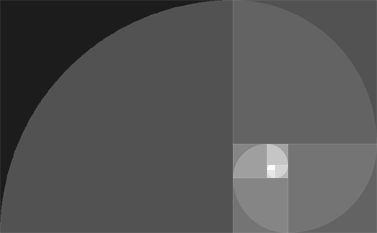 Goldenes Rechteck mit Goldener Spirale, approximiert durch Viertelkreisstücke